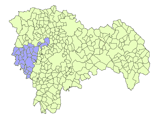 Municipios incluidos en la comarca de la Campiña de Guadalajara.